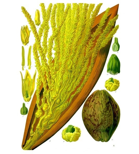 Kokospalme. A Blütenstand; 1 Männliche Blüte im geschlossenen Zustande; 2 Männliche Blüte im reifen Zustande; 3 dieselbe stärker vergrössert und vorn geöffnet; 4 Staubblatt von vorn; 5 dasselbe von hinten; 6 Weibliche Blüte; 7 Fruchtknoten; 8 derselbe im Längsschnitt; 9 junge Frucht, von den Blumenblättern noch umschlossen; 10 junge Frucht nach Entfernung der Blumenblätter; 11 Frucht.